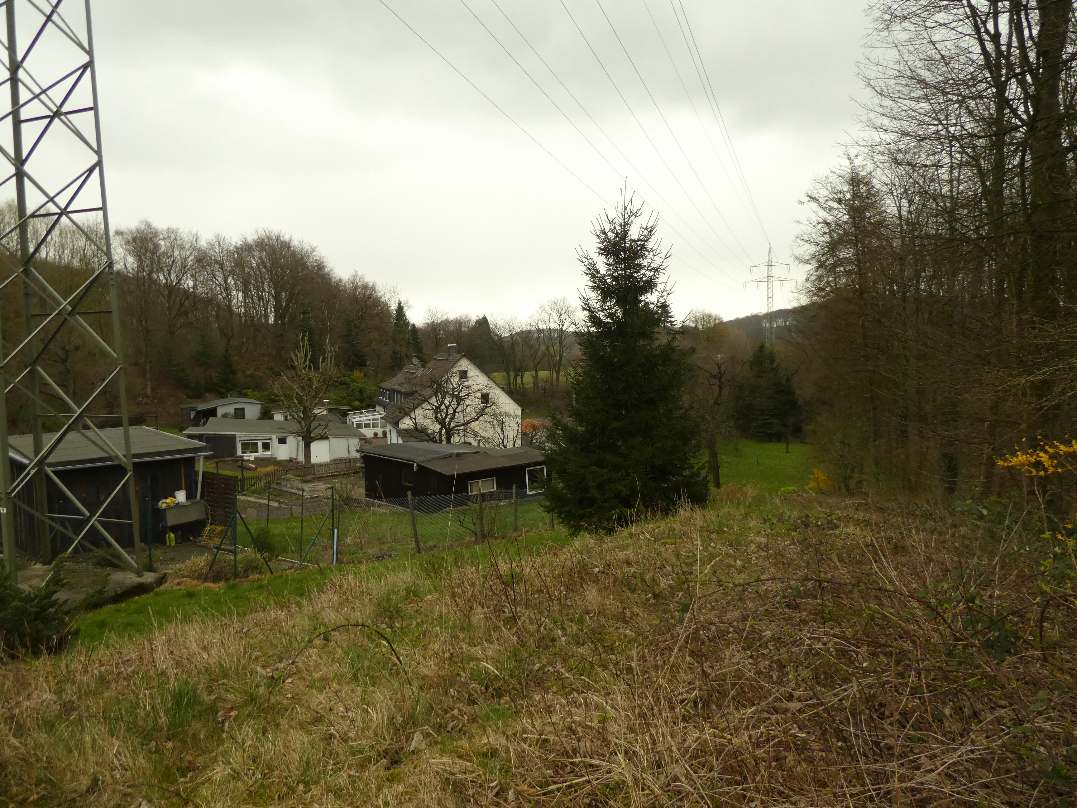 Velbert Hefel Gebäude der ehemaligen Alaunfabrik Aurora